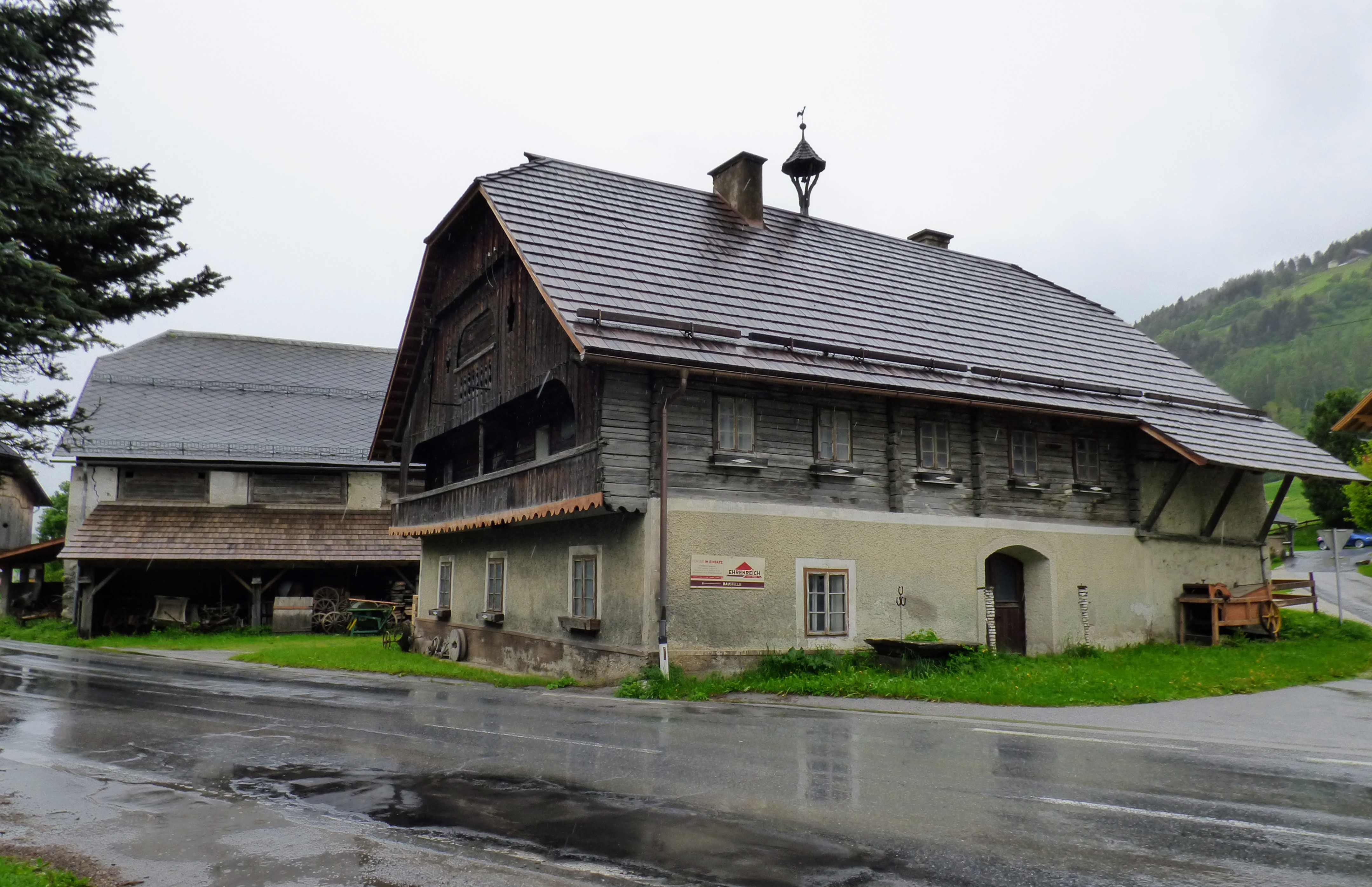 Paarhof Graggabergut, Neggerndorf (Gde. Unternberg, Salzburg); davor tischförmiger Stein/Römische Spolie